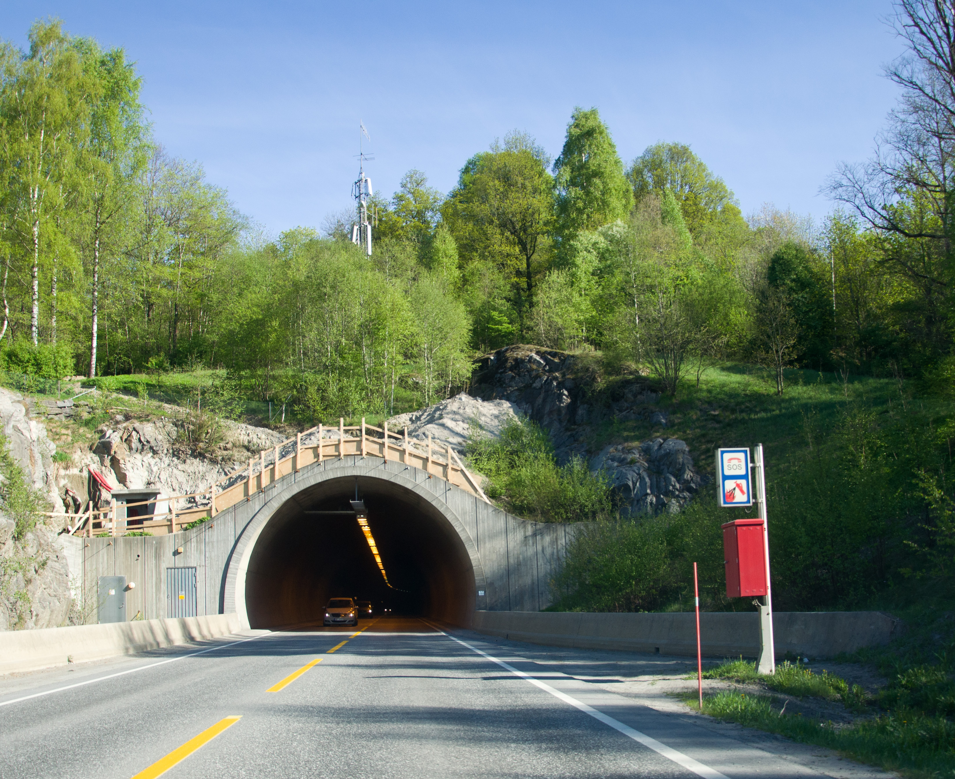 Vabakkentunnelen i Porsgrunn, Telemark, Norge